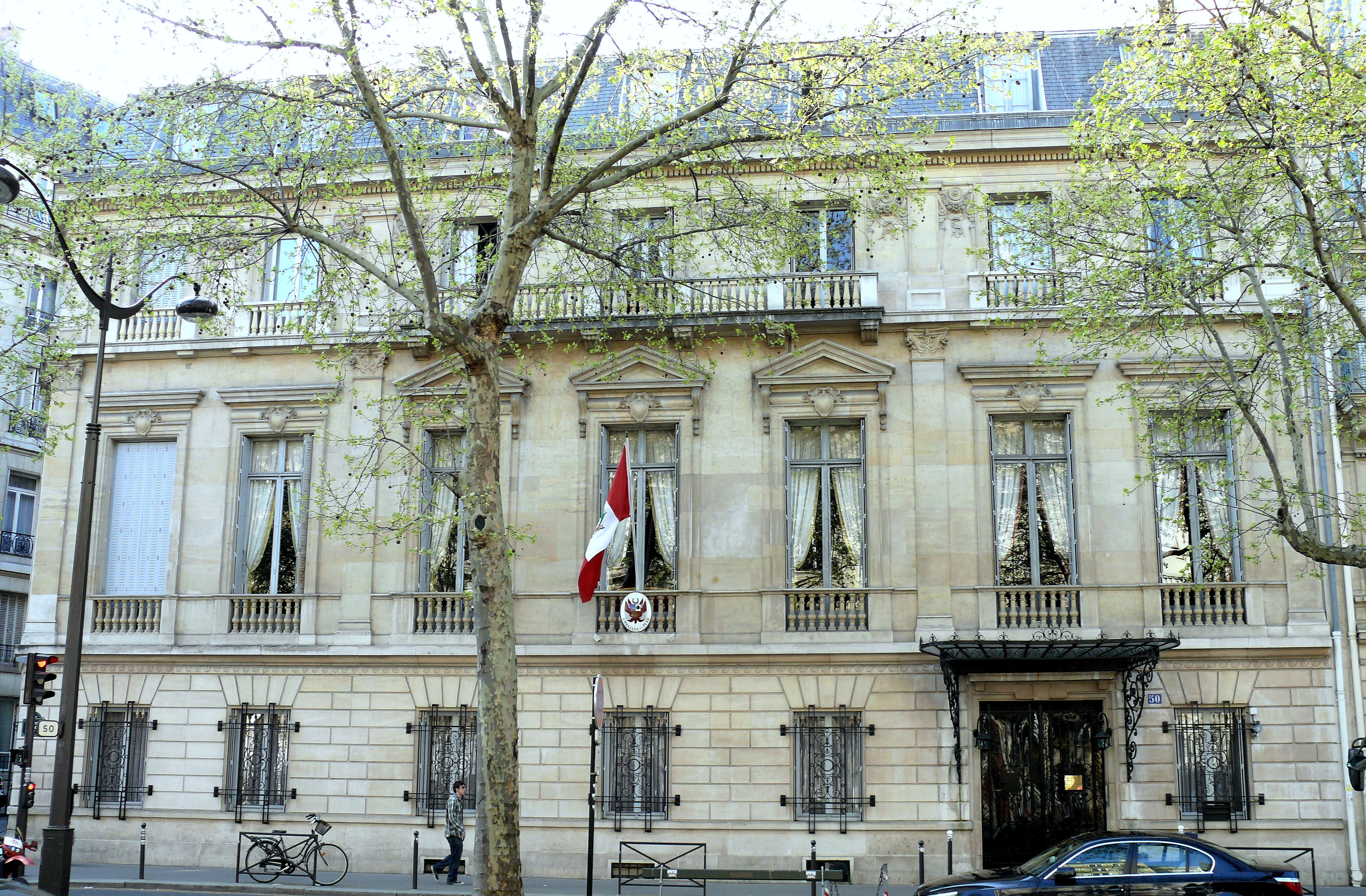 Paris 16ème arrondissement - Immeuble de l'ambassade du Pérou